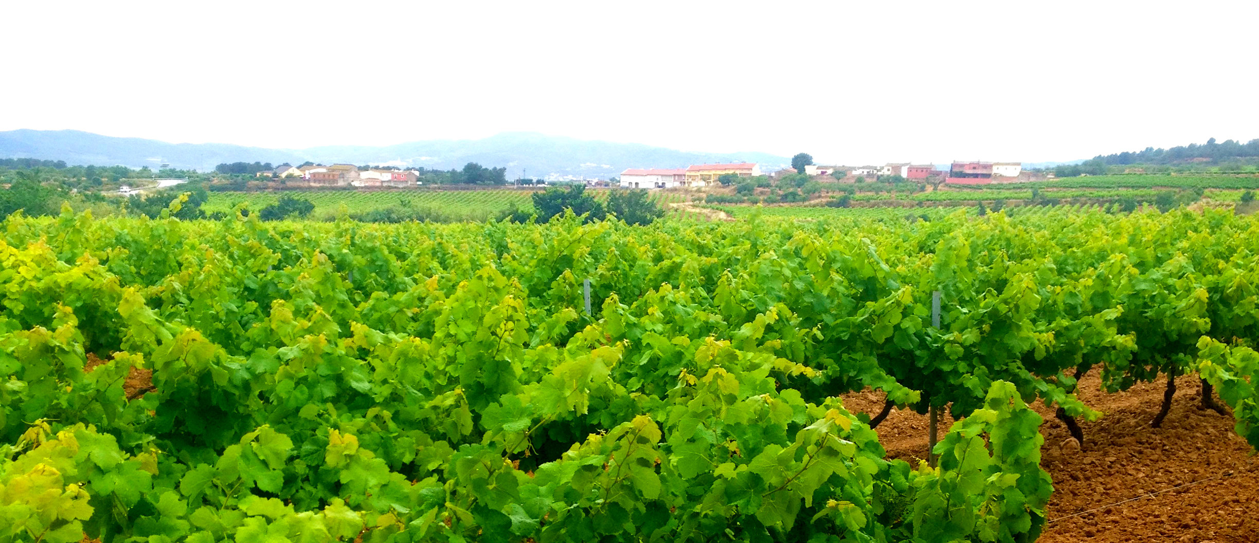 Tres trams del nucli de l'Hostal.